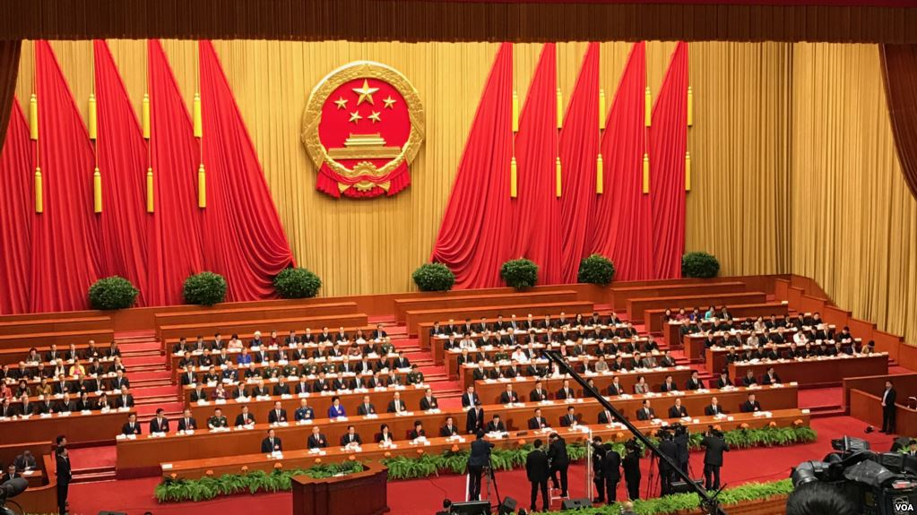 第十二屆全國人民代表大會第五次會議在北京人民大會堂開幕。